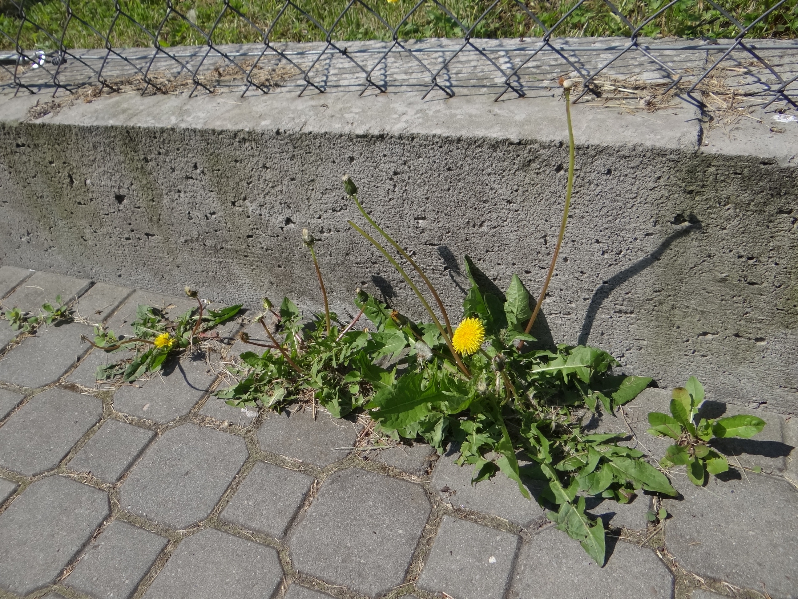 Taraxacum campylodes